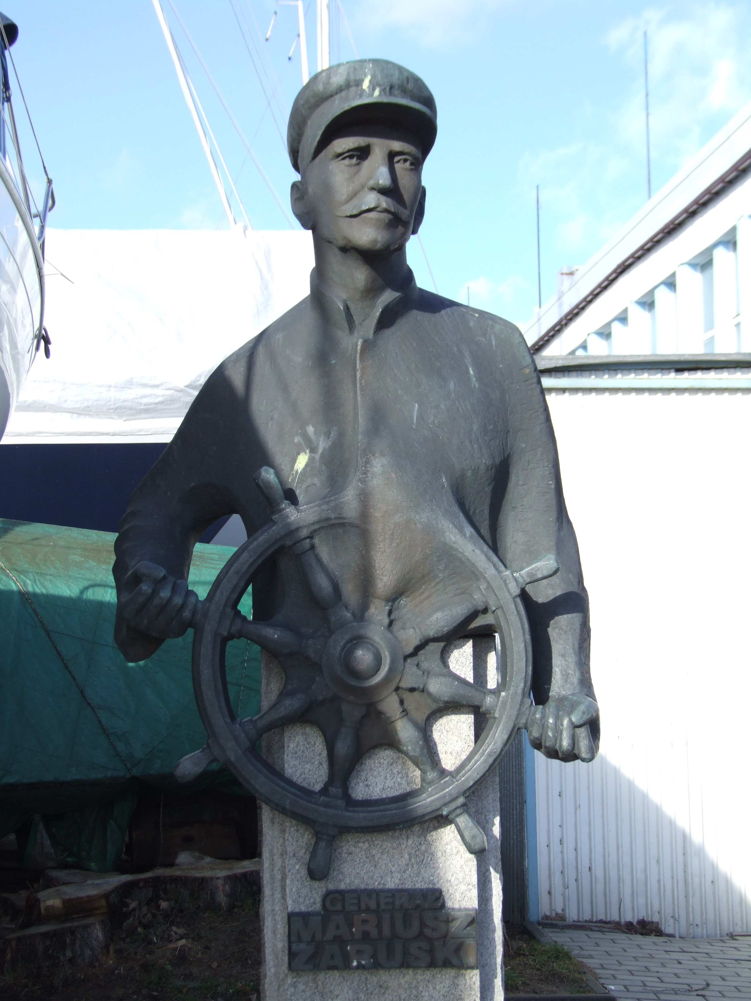 Pomnik generała Mariusza Zaruskiego - Gdynia